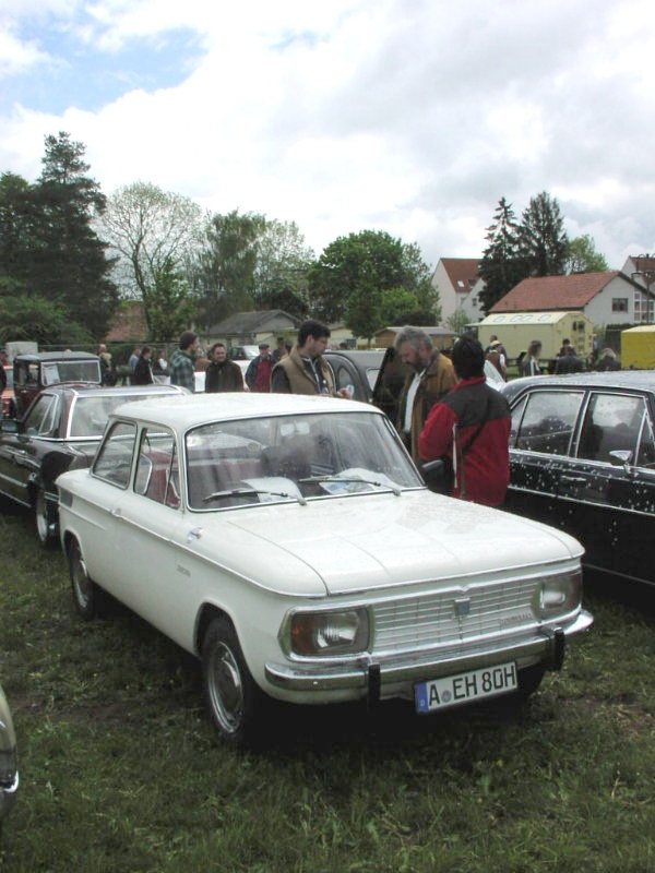 NSU Typ 110